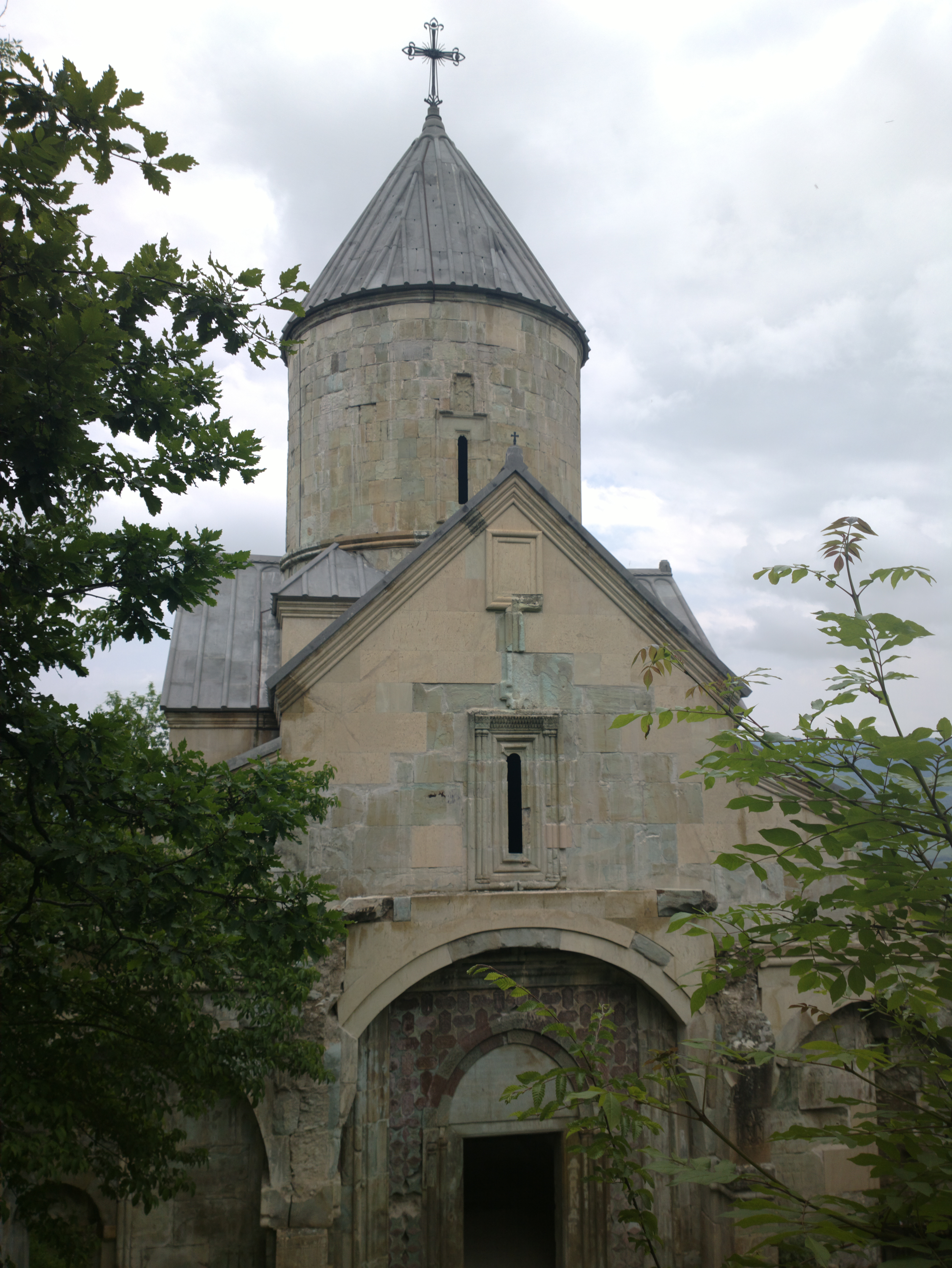 Վանական Համալիր Նոր Վարագավանք (Անապատ) 60/10